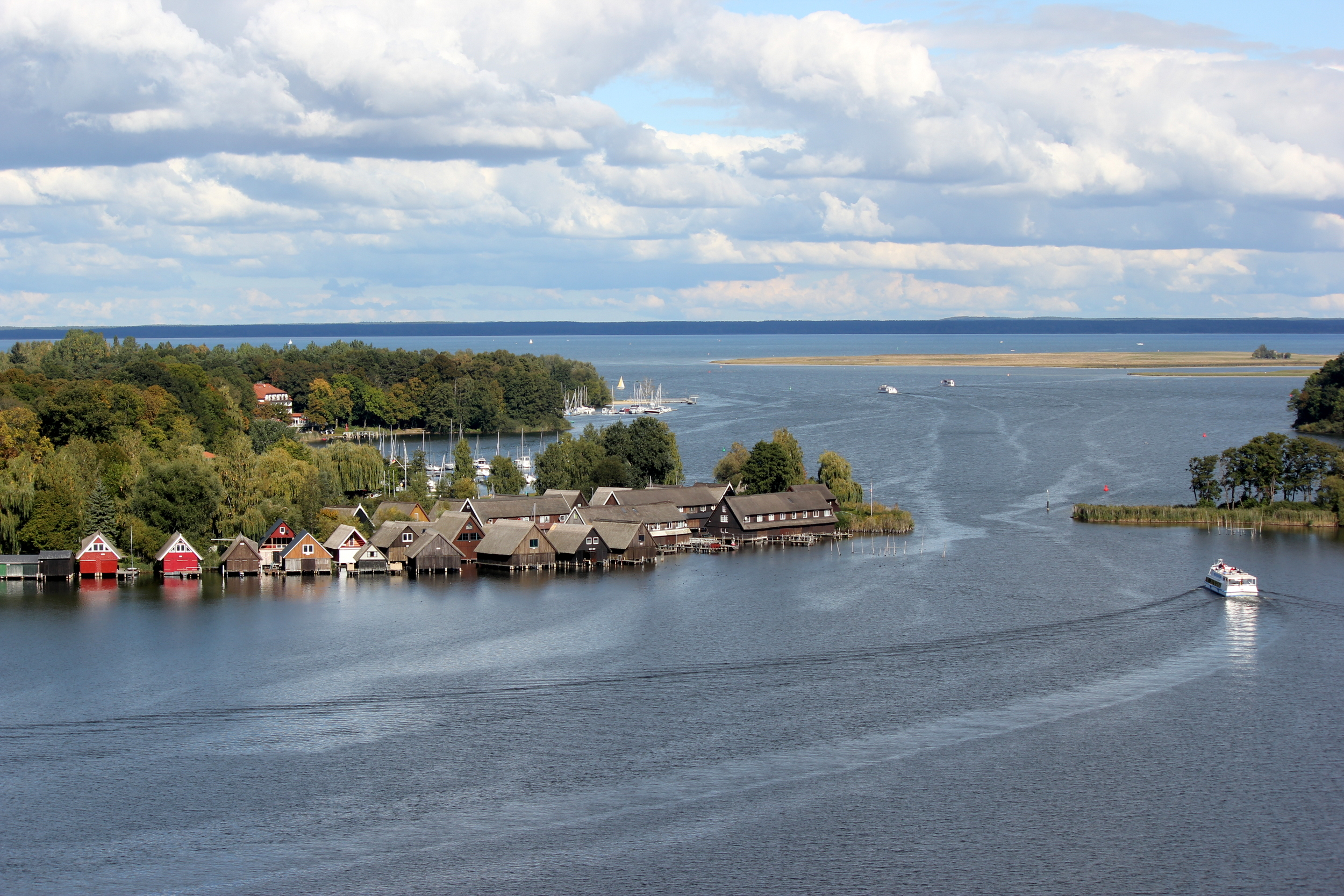 Hornjoserbsce: Přistaw w Röbelu při Moricy, Mecklenburgsko-Předpomorska.